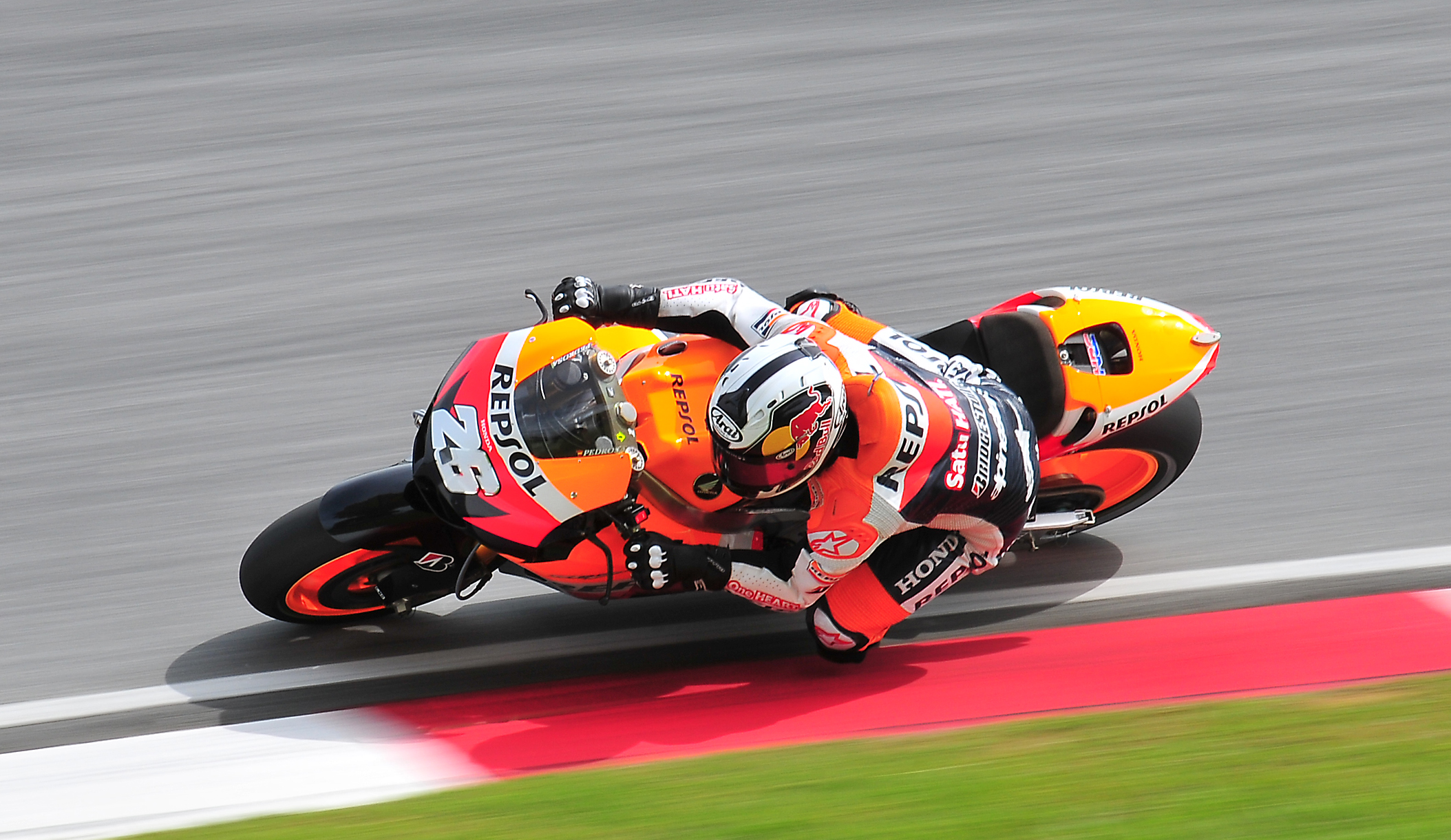 Dani Pedrosa - Repsol Honda Team